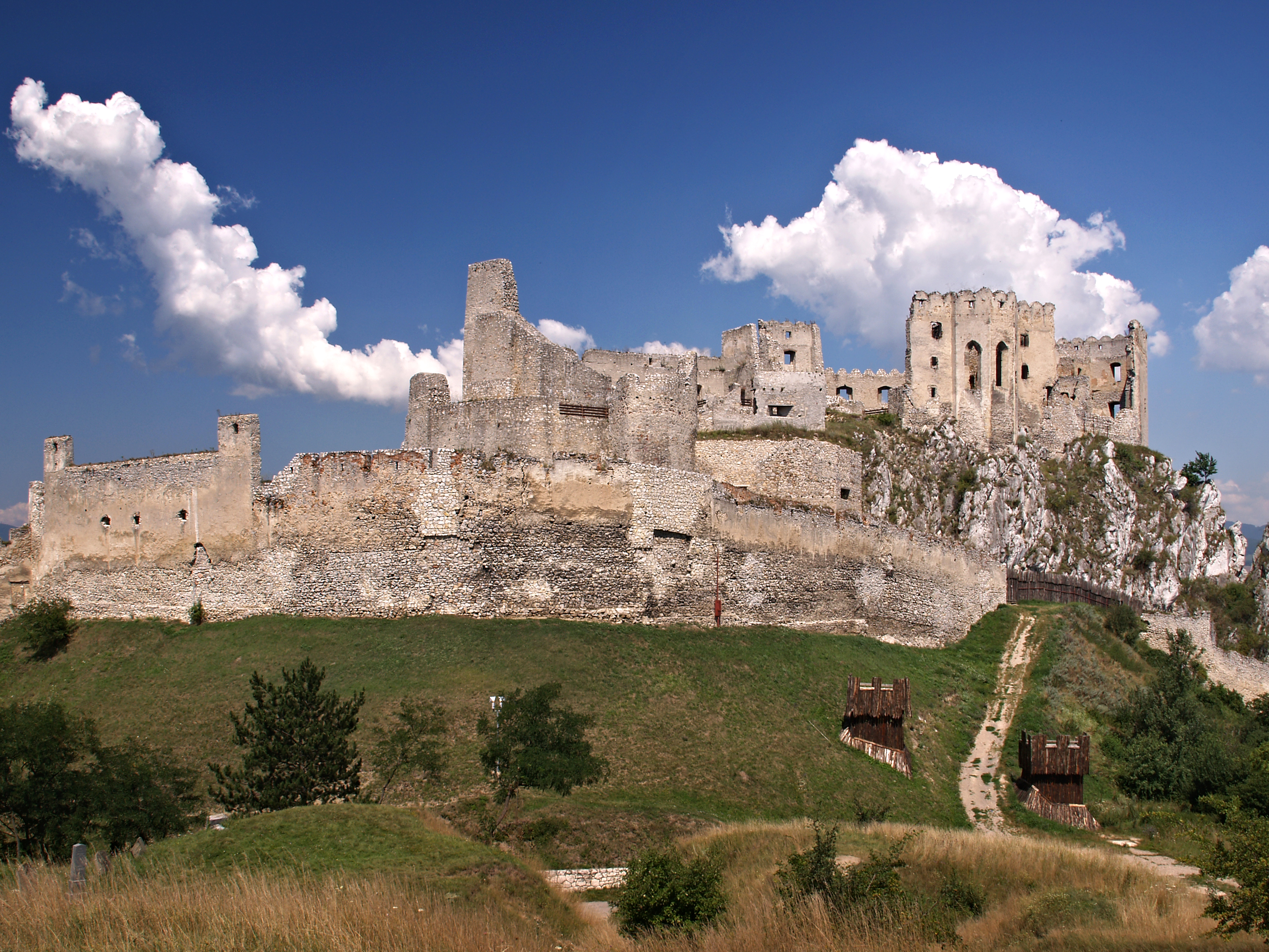 Beckov (Slovakia) - Vue des ruines du château royal